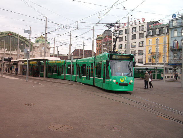 Ein Combinotram beim Bahnhof SBB in Basel